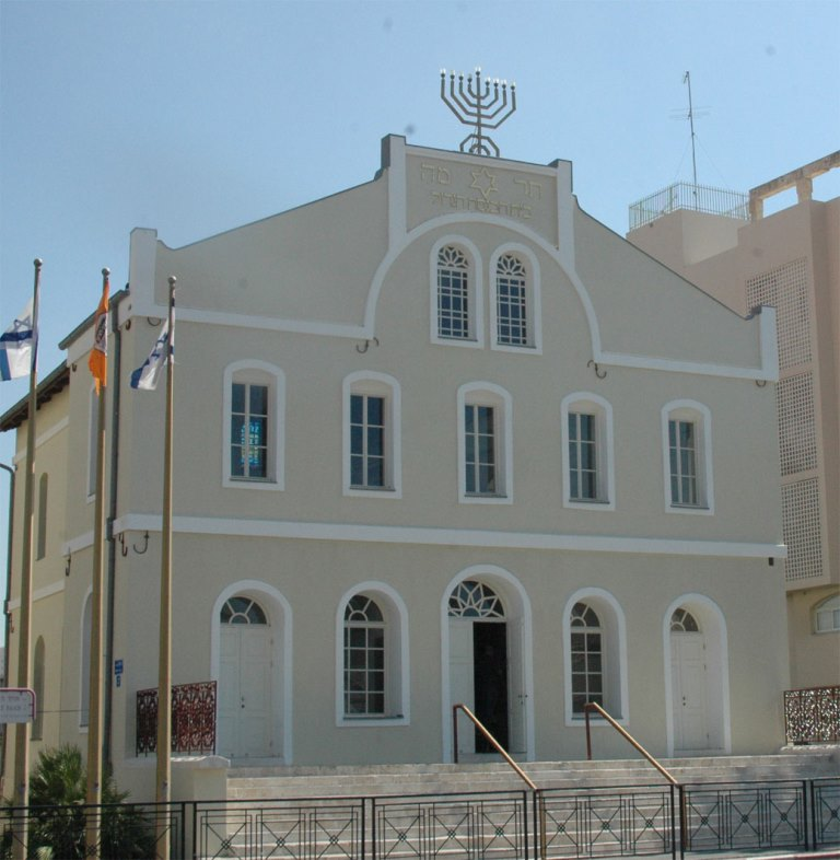 בית הכנסת הגדול בראשון לציון נבנה בשנים 1885–1889, והיווה מוקד חשוב בחיי המושבה. בית הכנסת ניצב על פסגת גבעה, בקצה רחוב רוטשילד וכיכר המייסדים במפגש עם רחוב אחד העם, והוא בולט למרחוק.